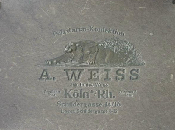 Aufschrift auf einer Schachtel der Kölner Firma A. Weiss, Pelzwaren-Konfektion. Pelzwaren-Konfektion A. Weiss, Inh. Ludw. Weiss, gegründet 1854, Köln a. Rh., Schildergasse 14/16, Lager: Schildergasse 8/12.